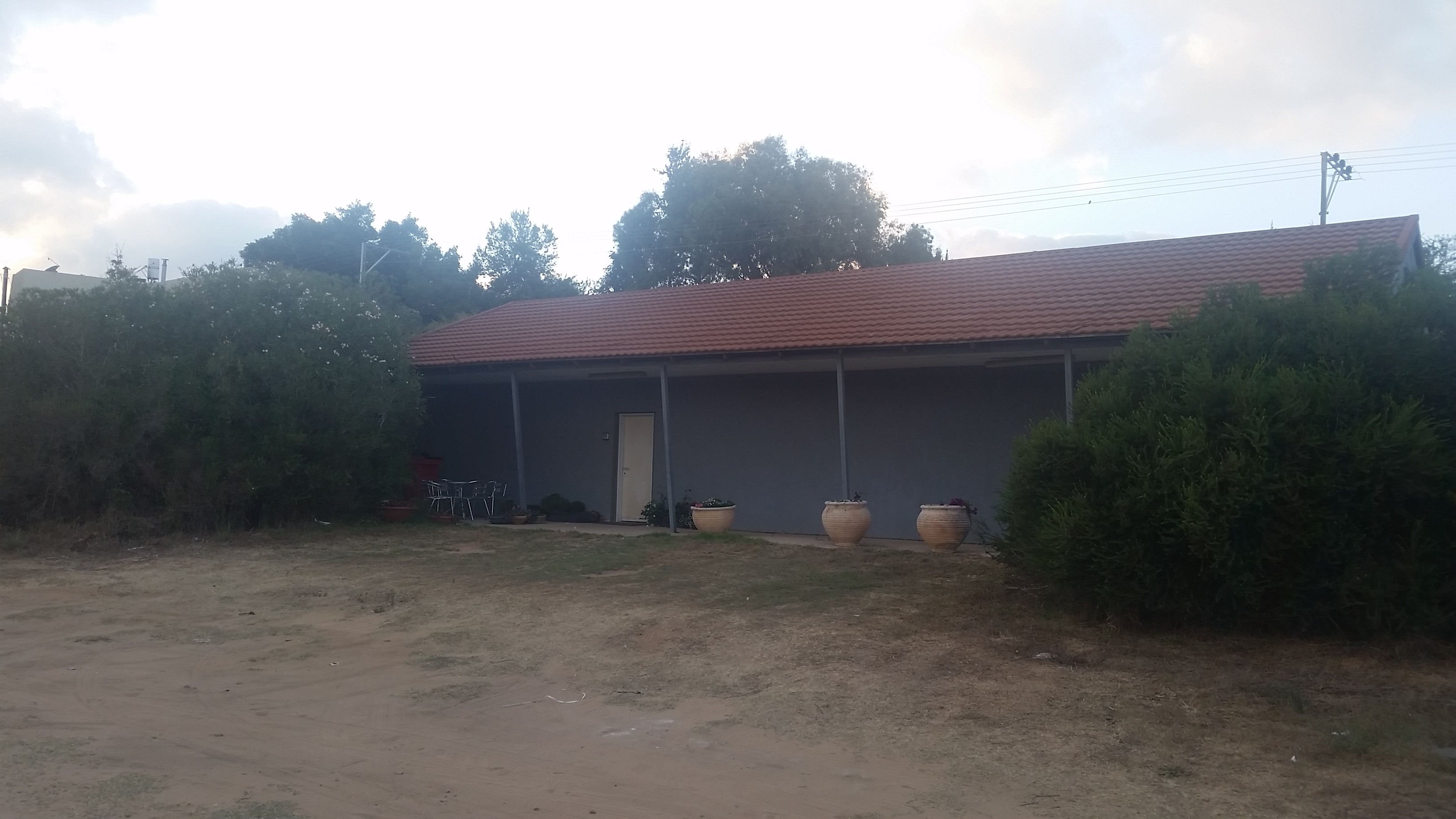 בית הספר הישן בחניאל, כיום מועדון